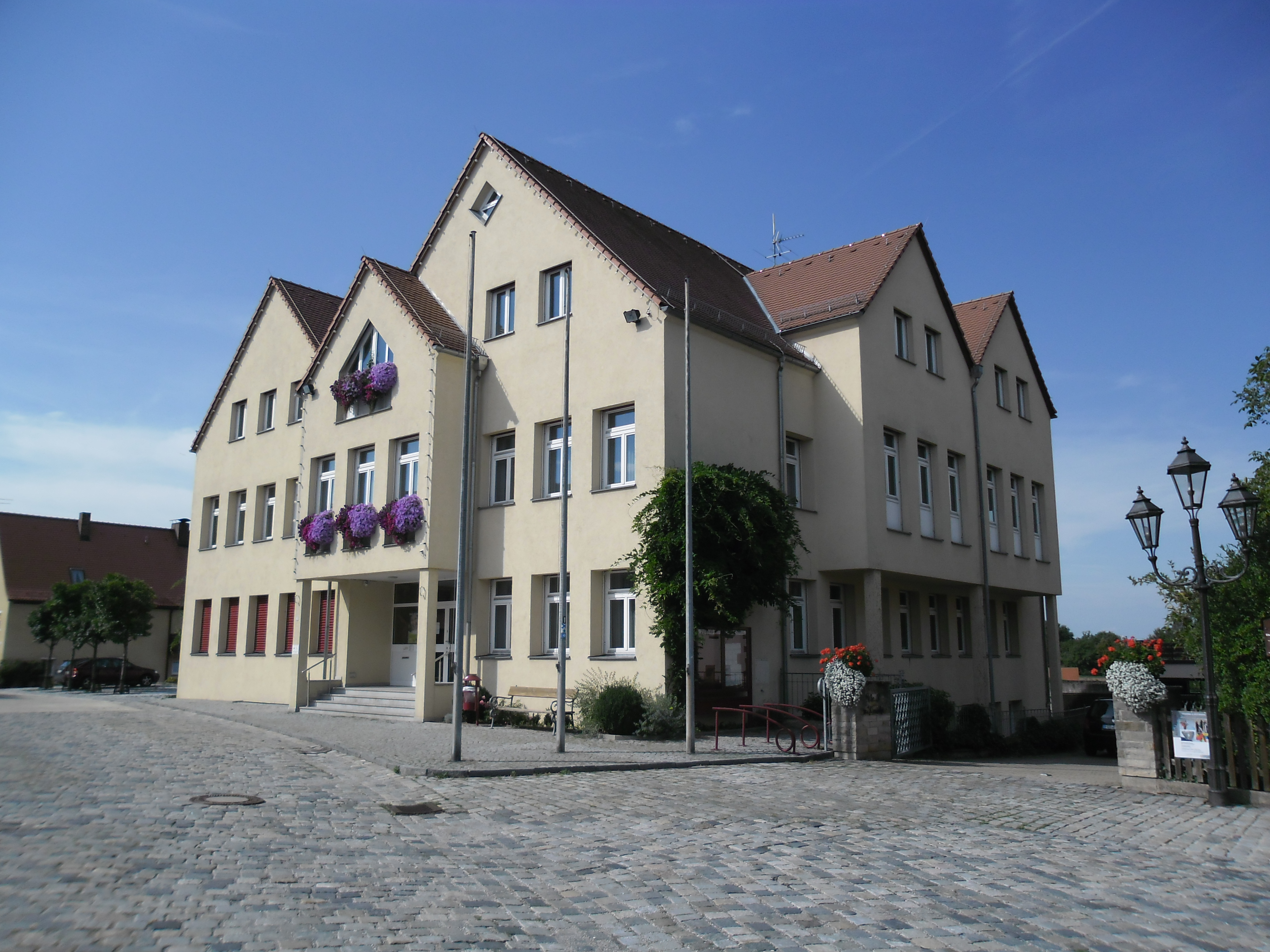 Rathaus Roßtal (Marktplatz)